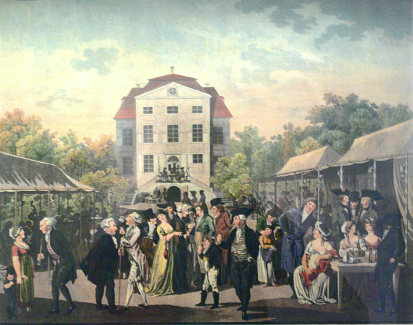 Café und Museum "Zum arabischen Coffe Baum", Leipzig "Amusemens Publics in Leipzig"